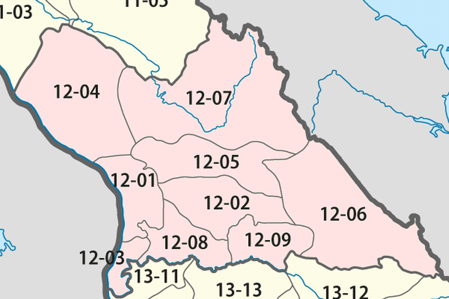 Giấy phép